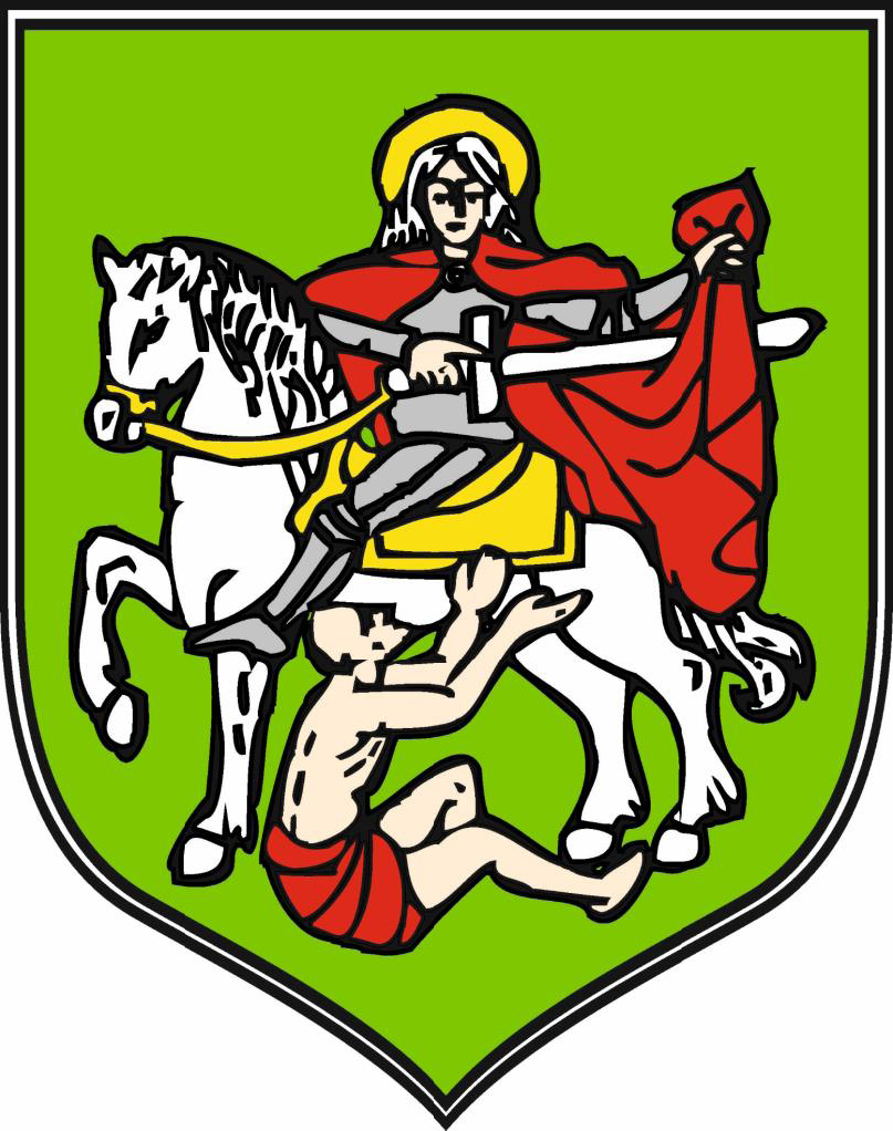 Herb miasta Pacanów.